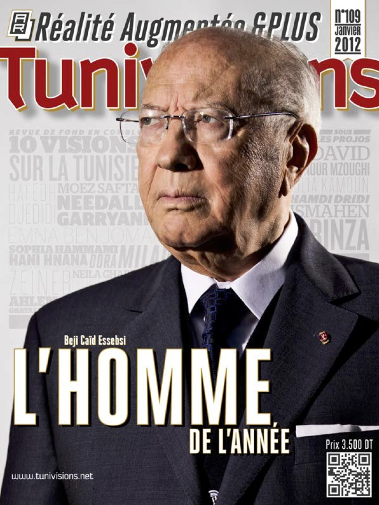 Couverture du numéro 109 du magazine tunisien Tunivisions.